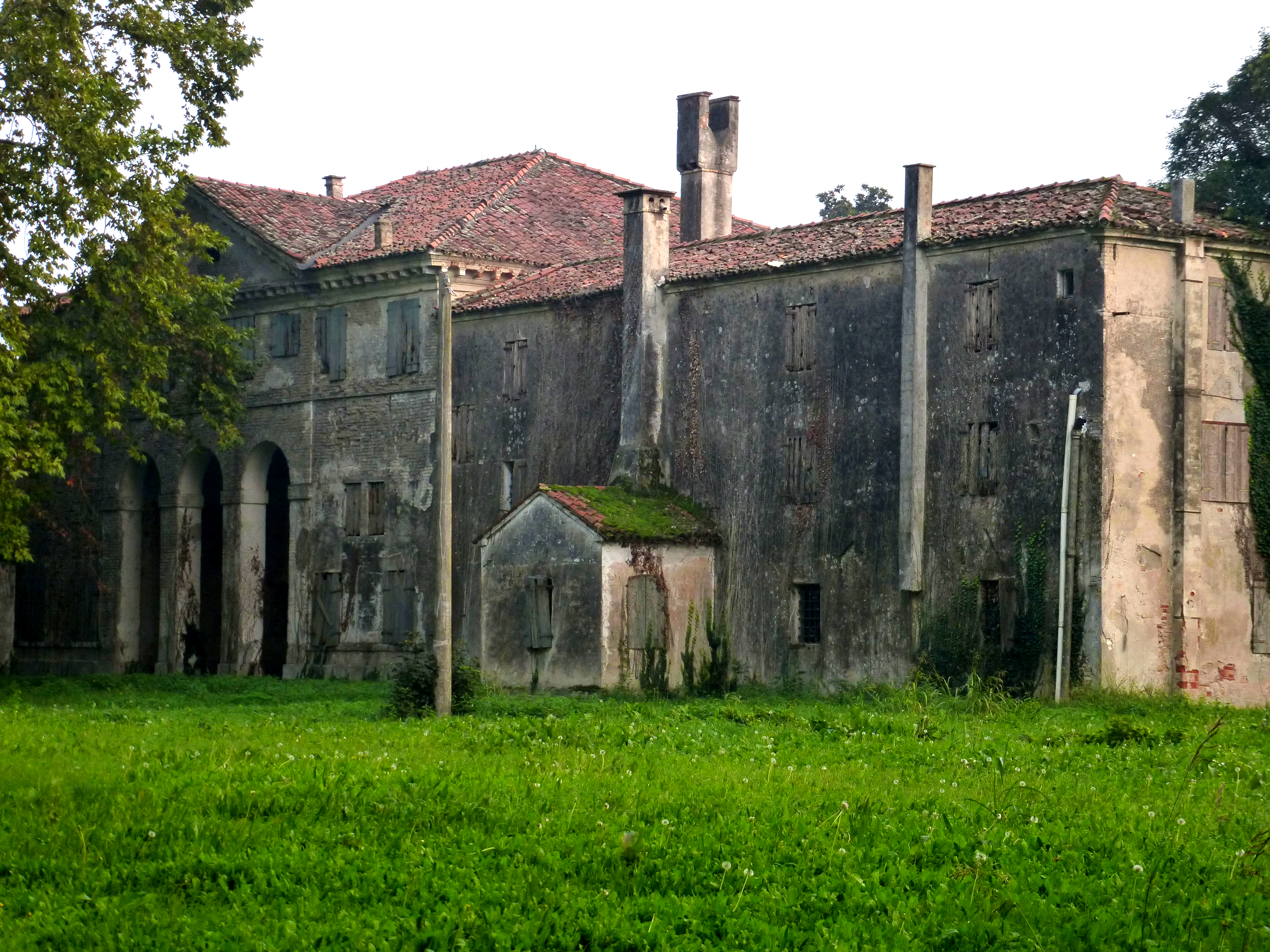 Villa Zeno von Andrea Palladio (ca. 1565) im Ortsteil Denegal di Cessalto